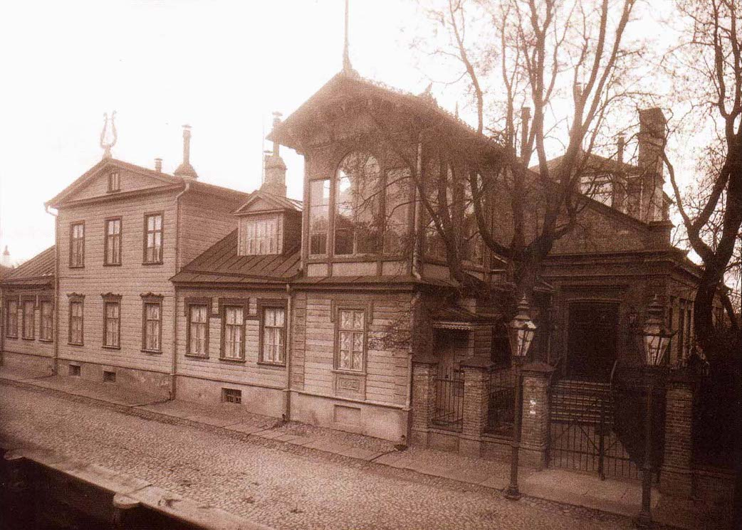 Teatrimaja Karlova tänaval, Tartu